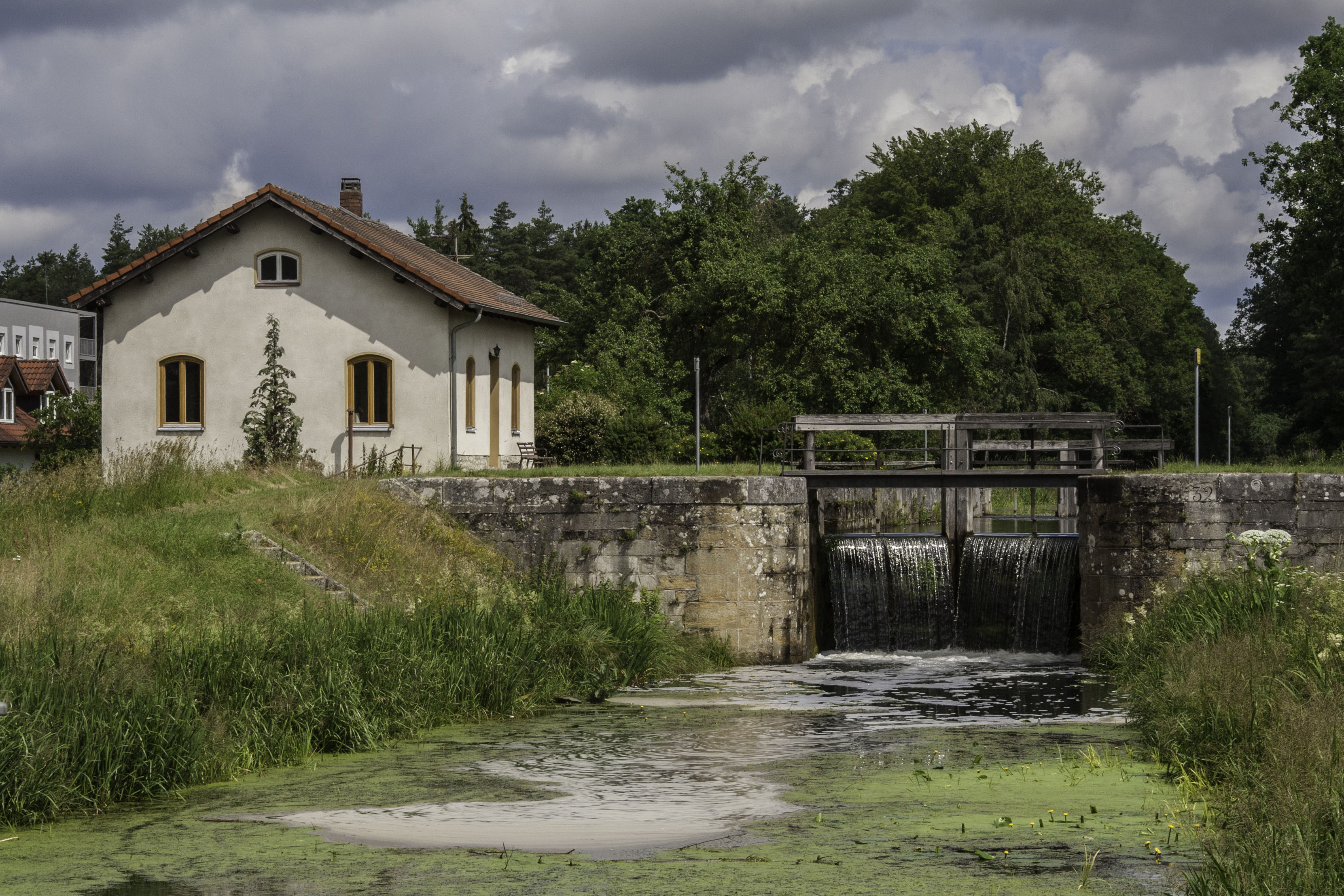 Schleuse 32, Ludwig-Donau-Main-Kanal